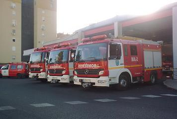 pinoparque